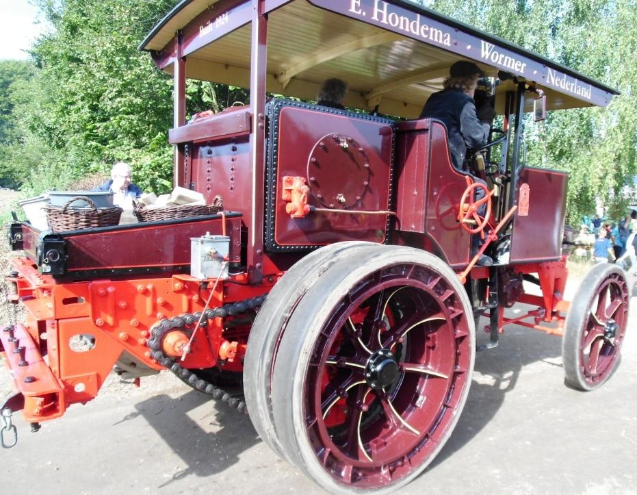 Der Elephant Sentinel Super Tractor beim 24. Dampf- und Traktorentreffen beim Kiekebergmuseum